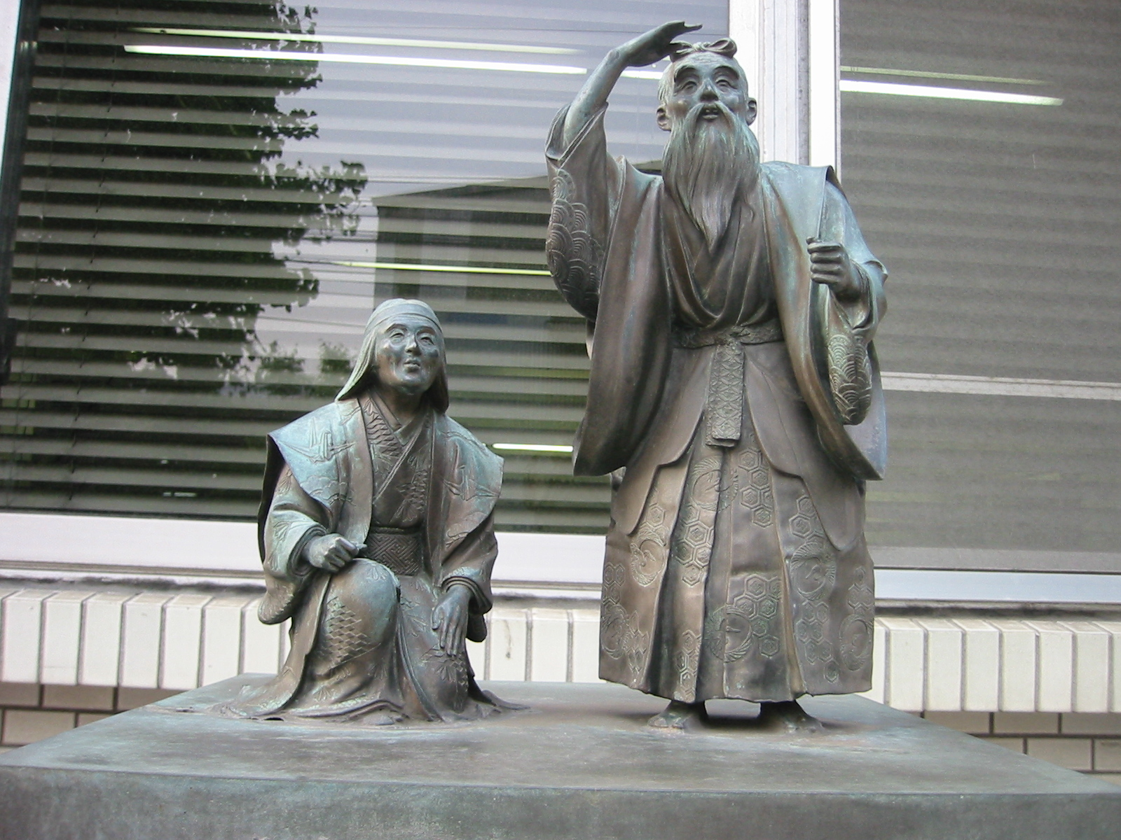 能 高砂の尉と姥(じょうとうば)の老夫婦(イザナギとイザナミ)、翁と嫗(おきなとおうな)とも